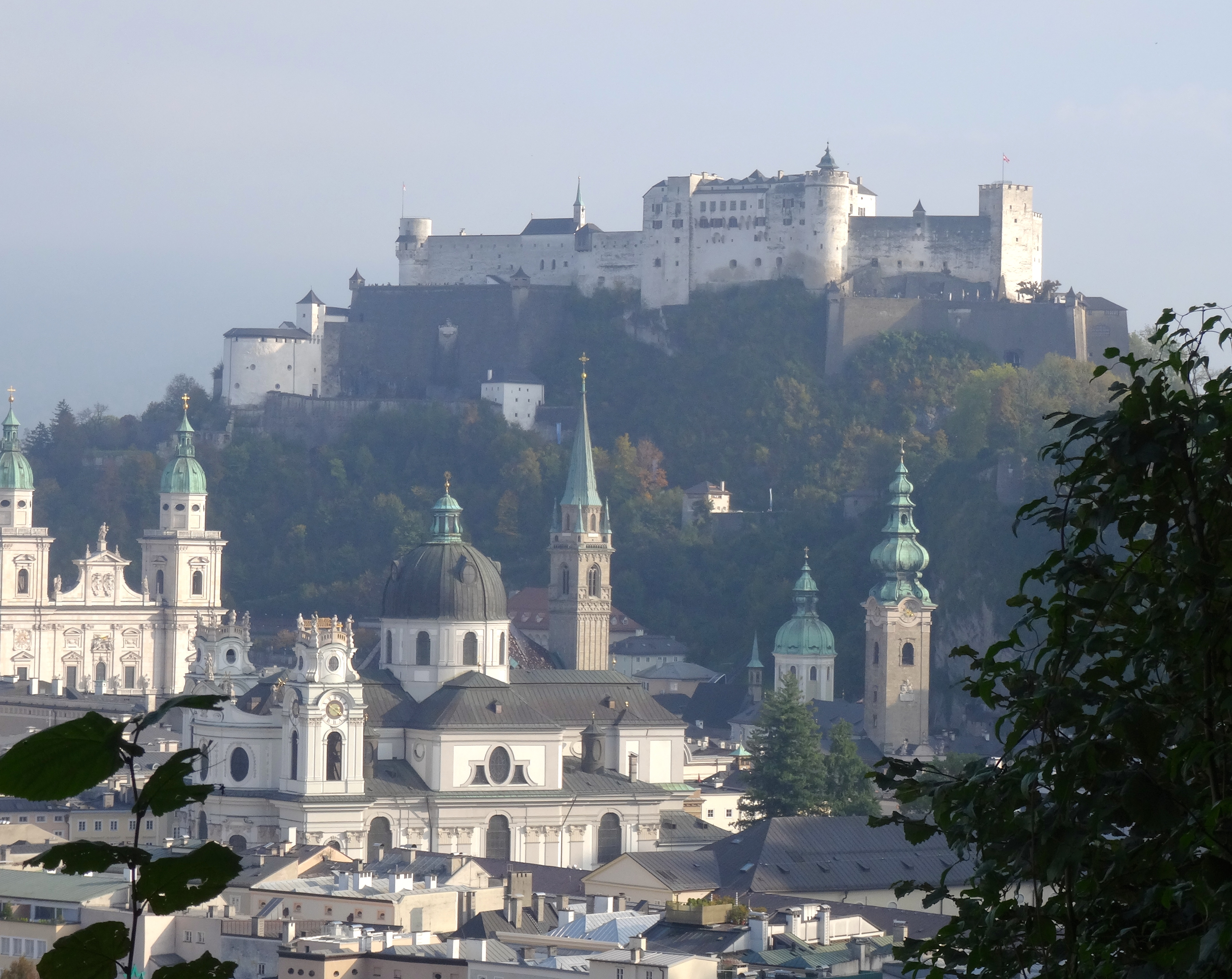 Festung Hohensalzburg